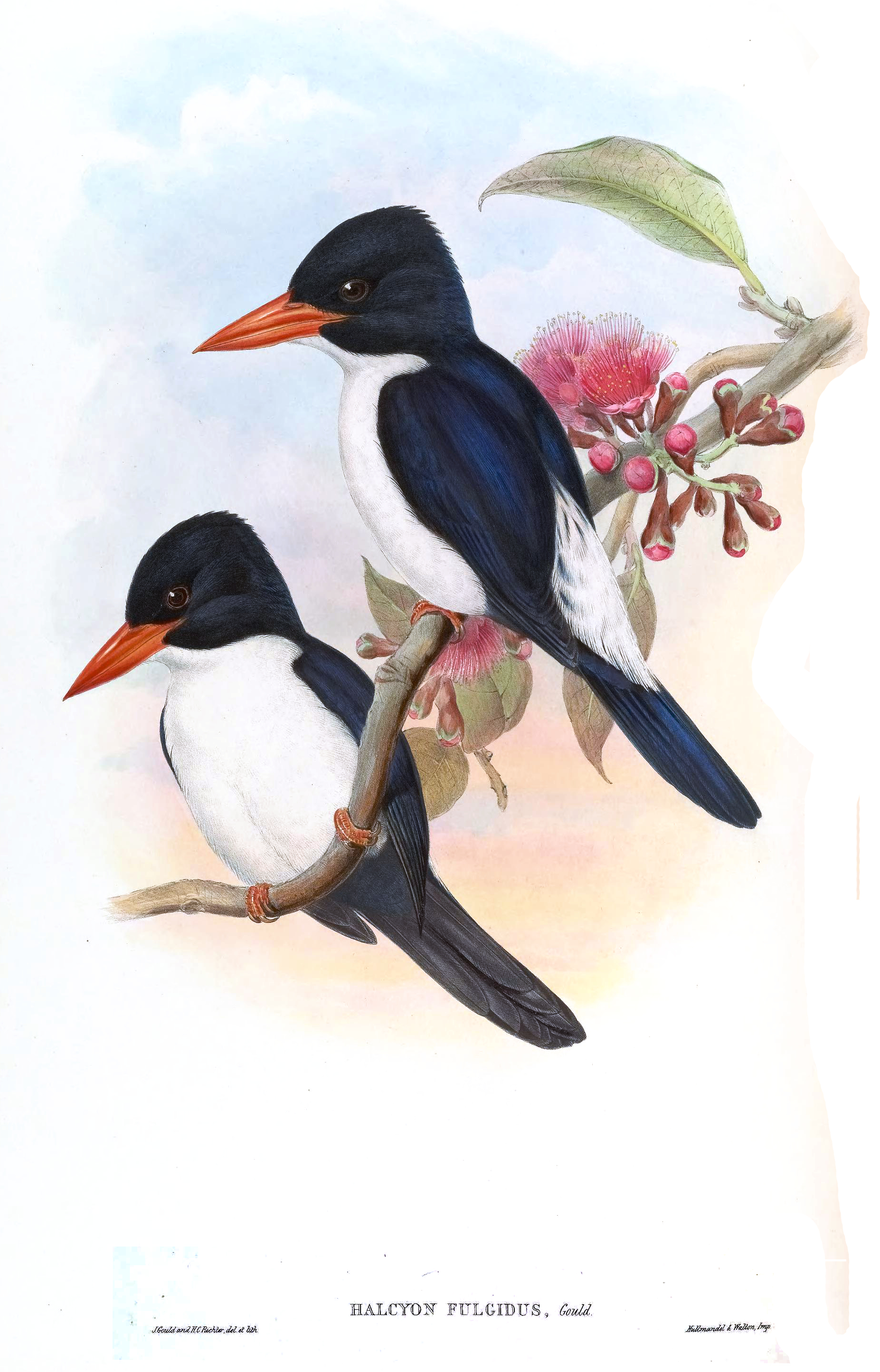 Halcyon fulgidus = Caridonax fulgidus